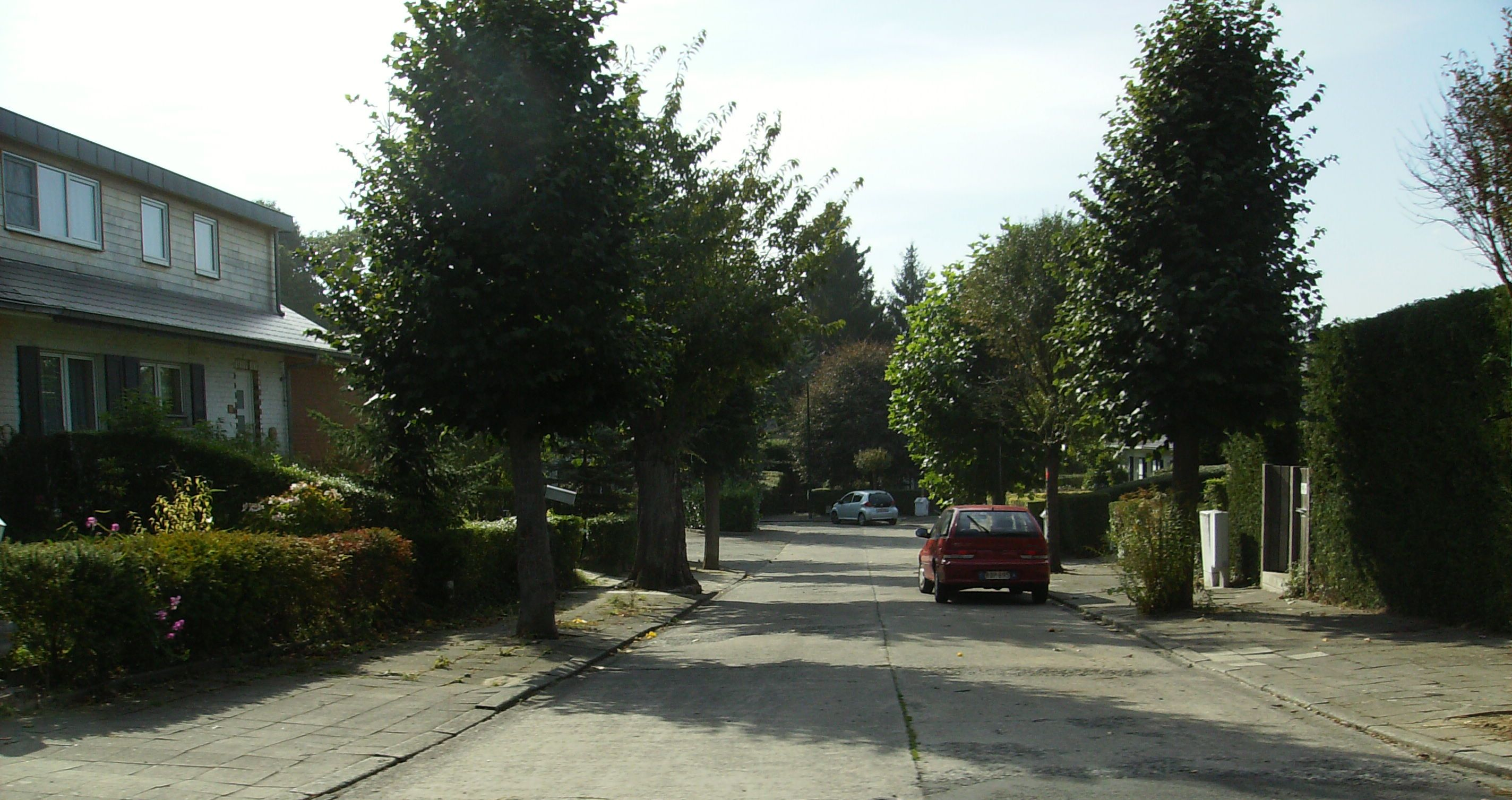 rue Léon Savoir Auderghem